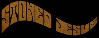 Bandlogo der Band Stoned Jesus